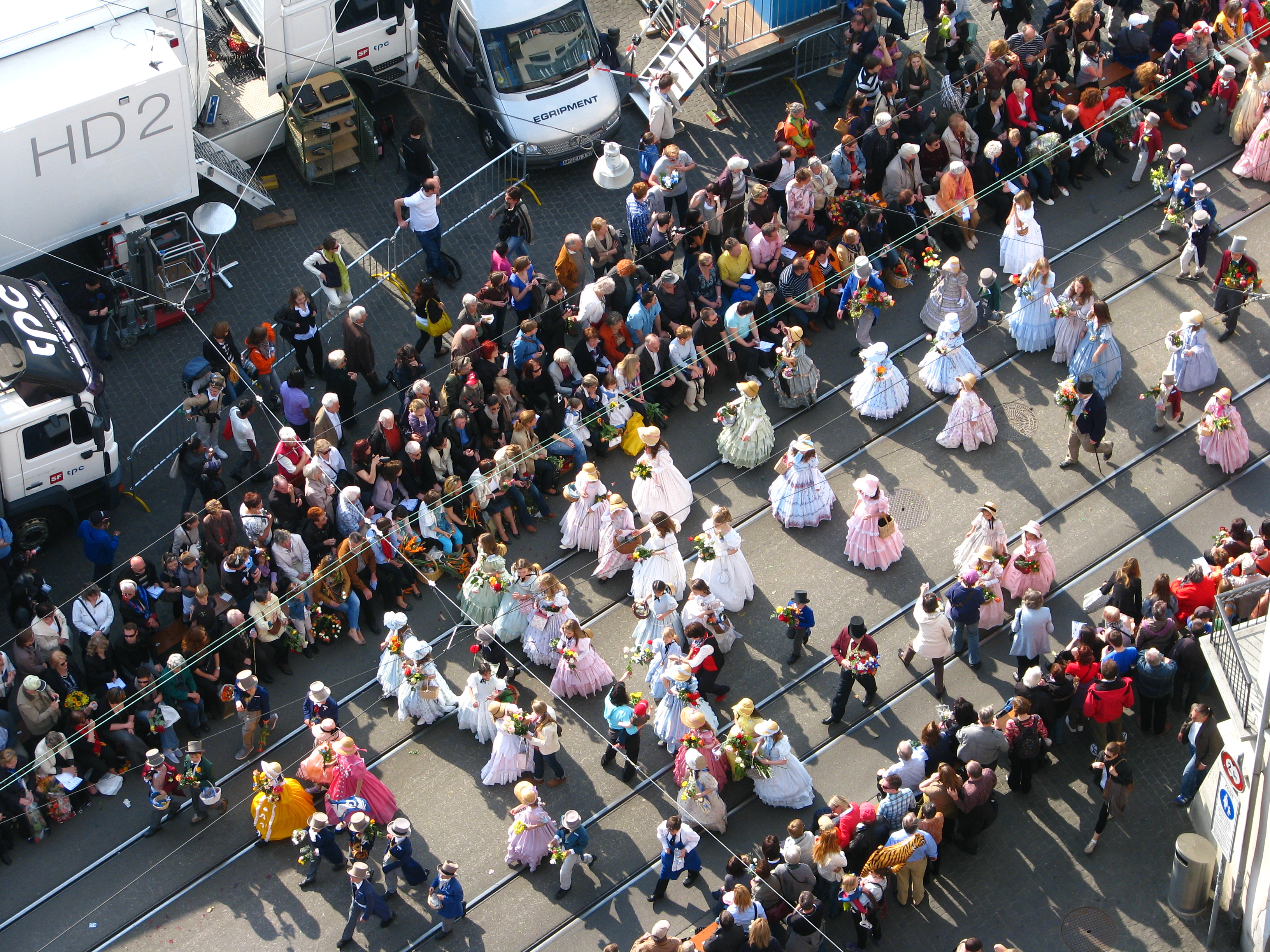 Sechseläuten on 19 April 2010 at Limmatquai in Zürich (Switzerland) as seen from Grossmünster's Karlsturm